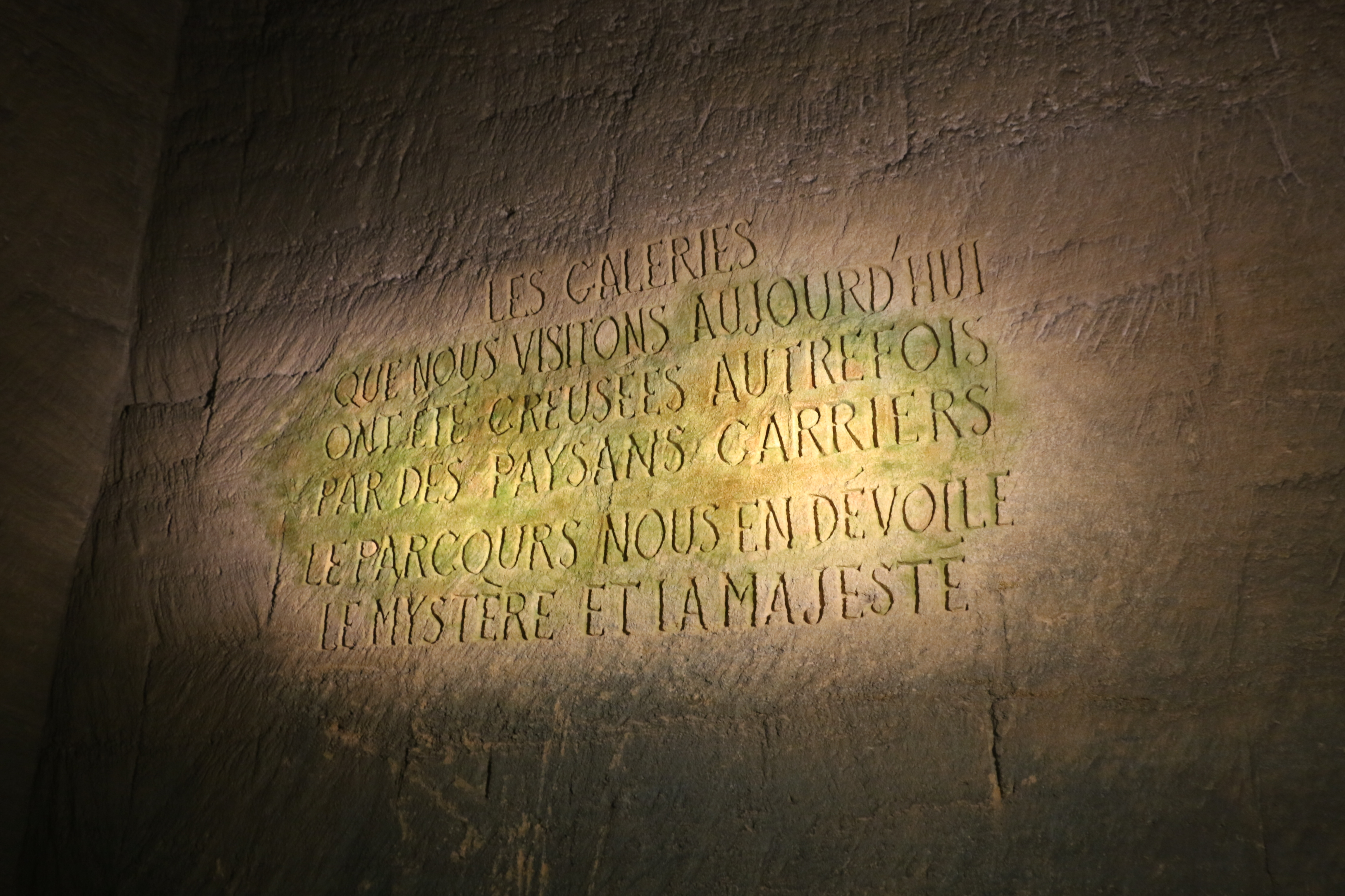 photo mur grotte